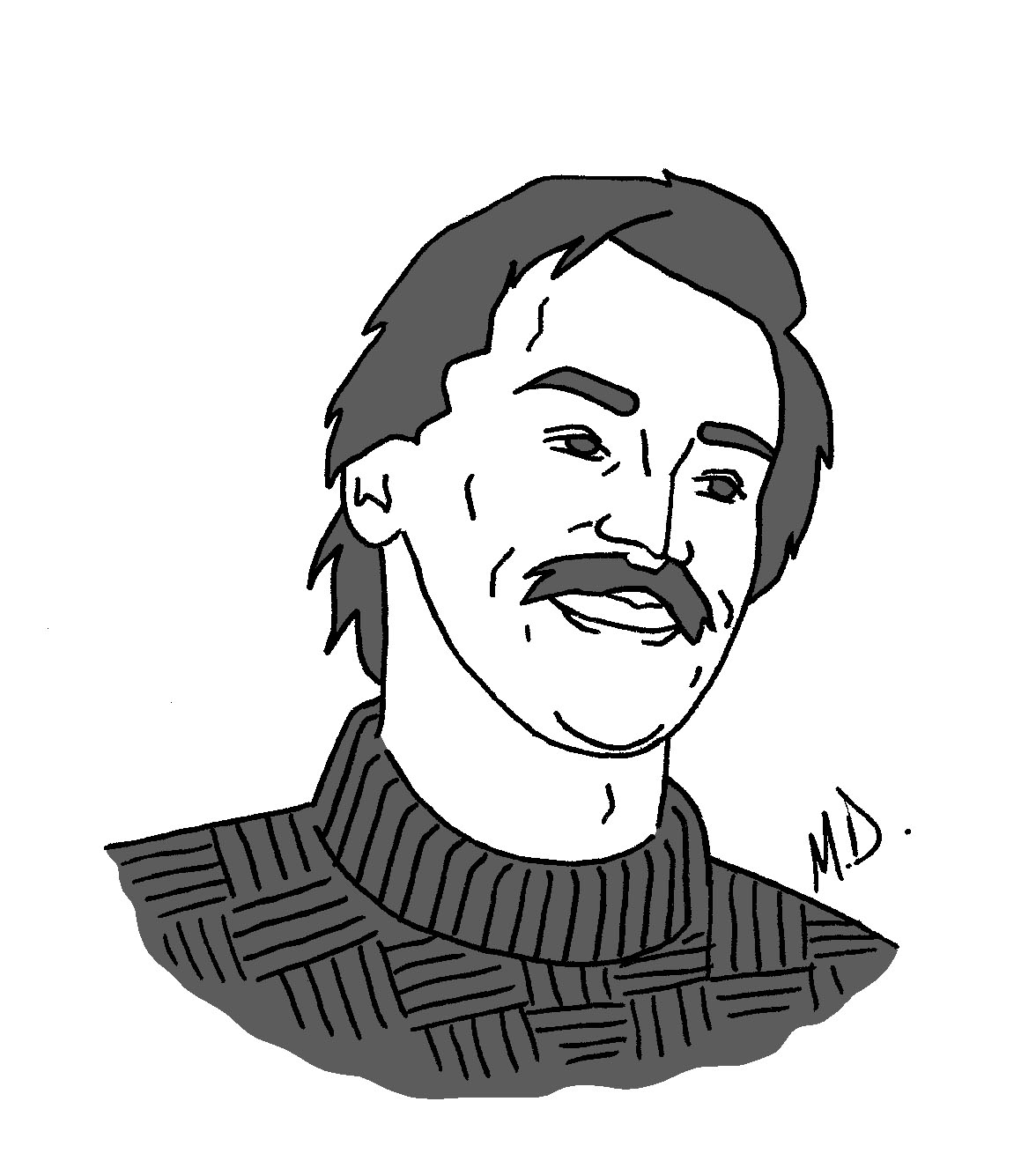 Ilustración Ilustradora Maia Debowicz- Roberto Jauregui proyecto Wiki Derechos Humanos LGBT+